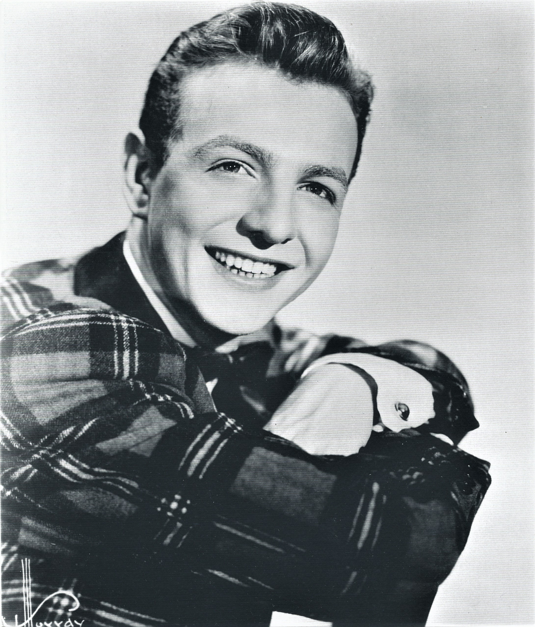 le magicien Pickpocket Dominique